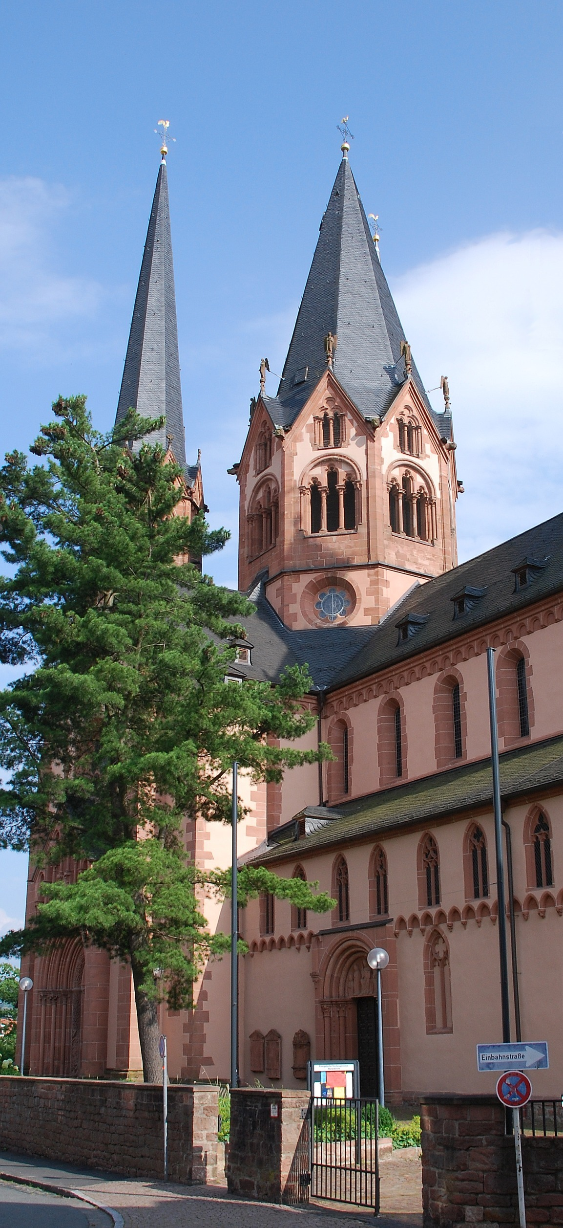 Vierungsturm und einer der Türme am Chor der Marienkirche in Gelnhausen